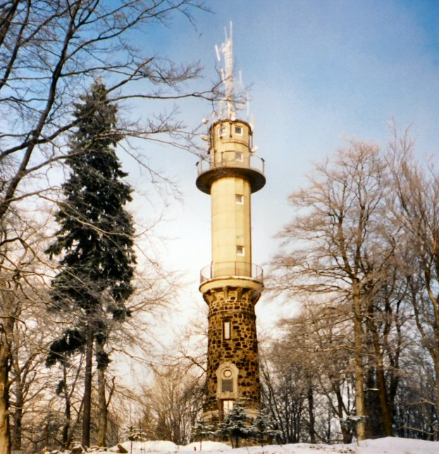 Autor: Thomas Schmidt,selbst fotografiert: GNU-FDL